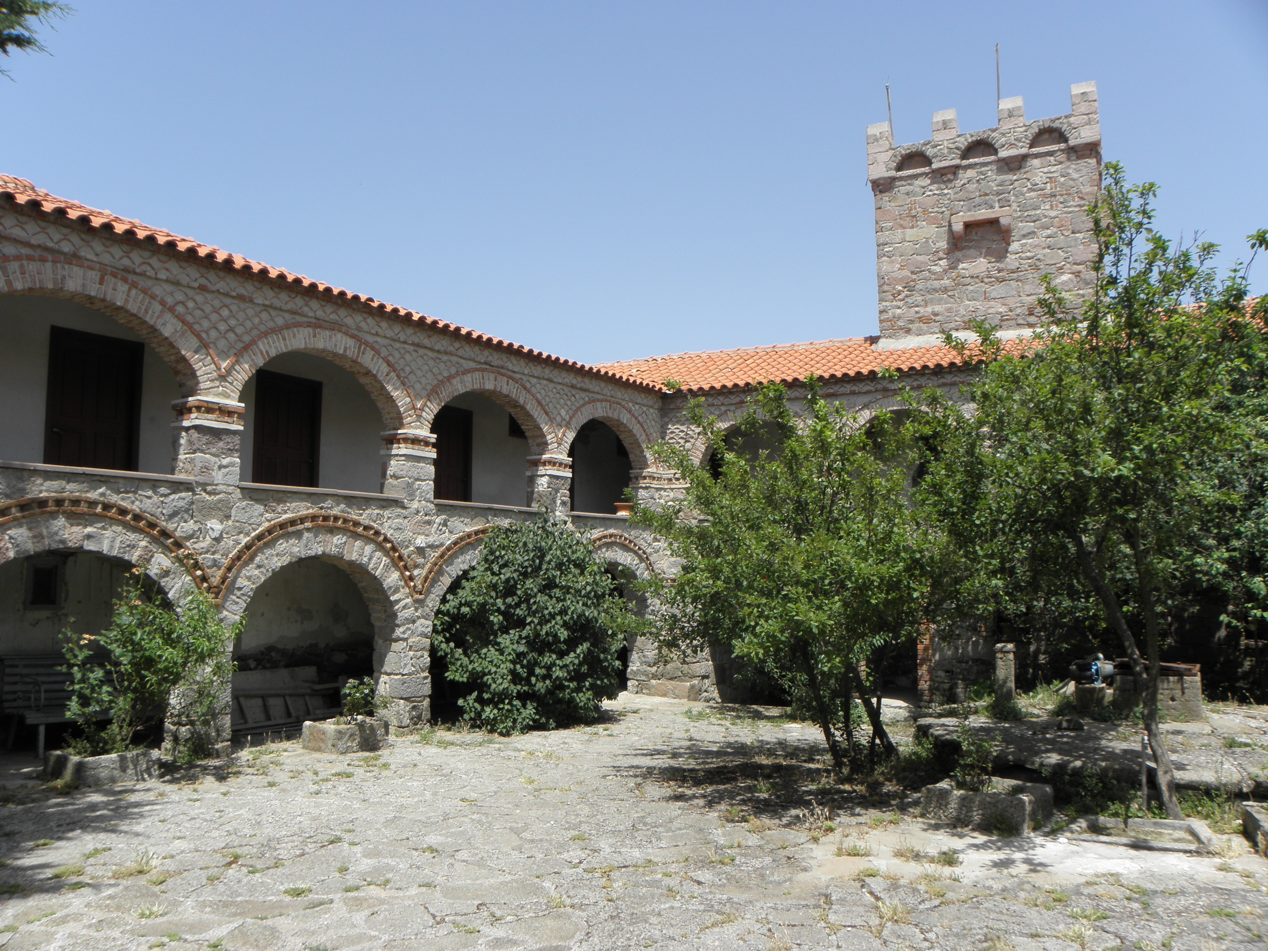 Klášter Ipsalou, Lesbos